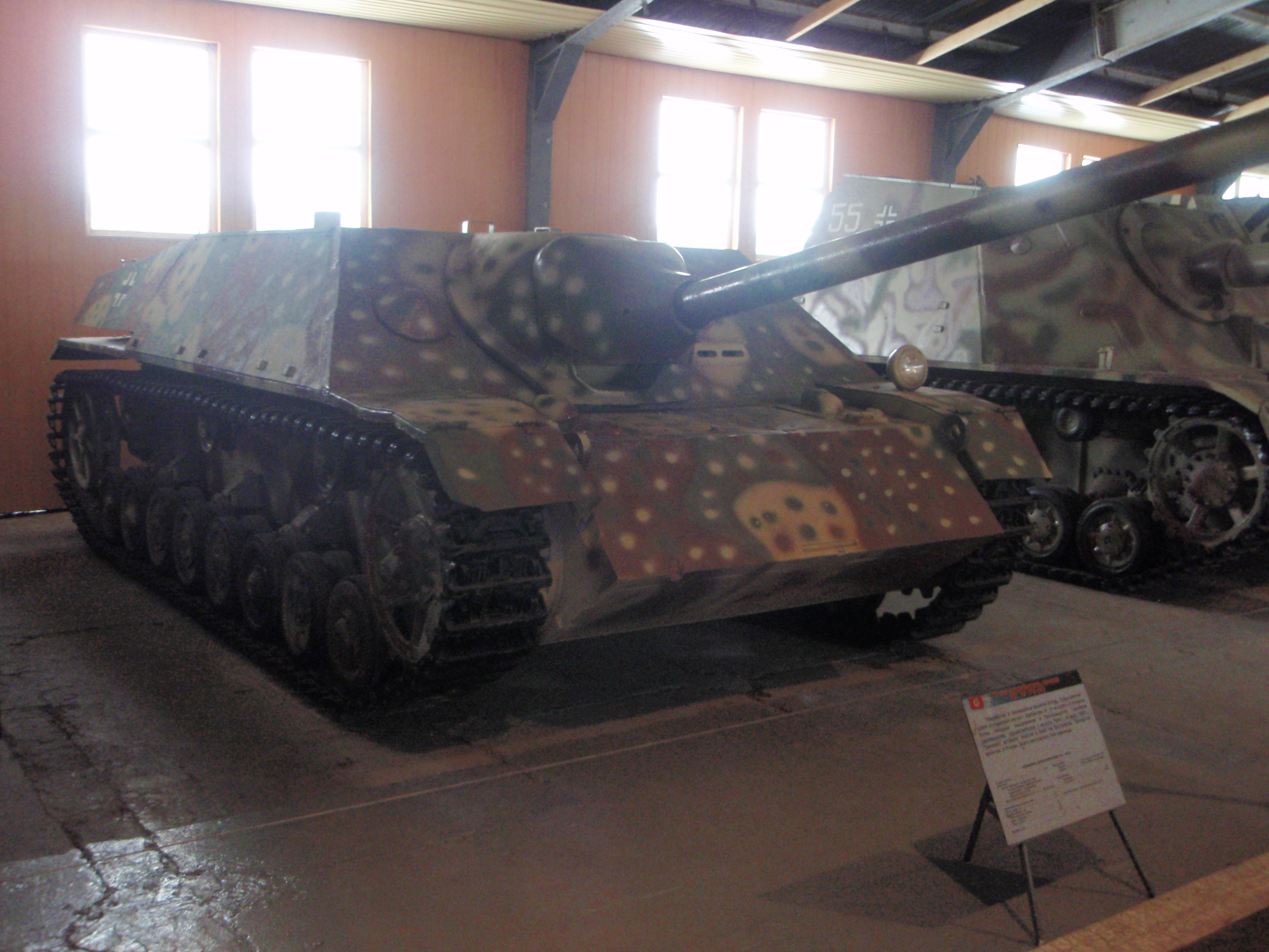 Немецкая САУ Jagdpanzer IV-70 в Кубинке